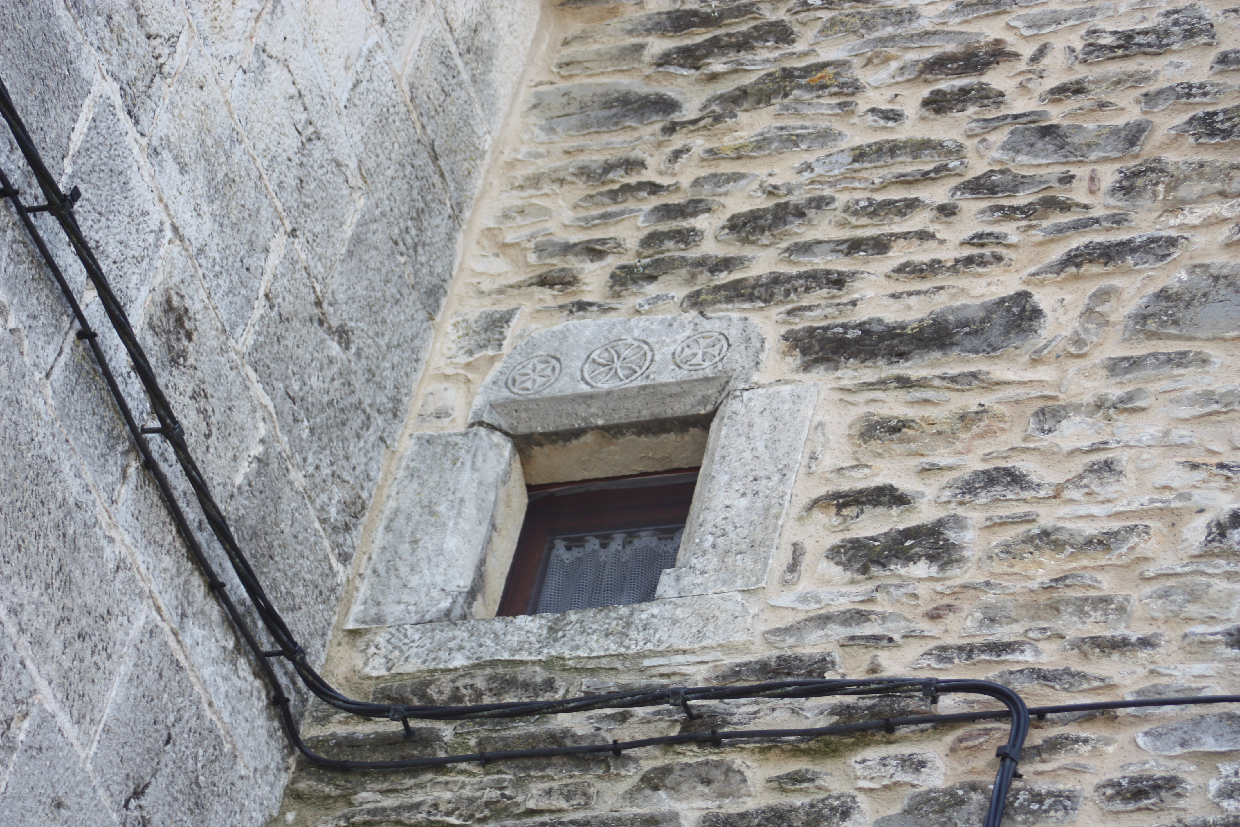 Detalle de símbolos grabados en ventana